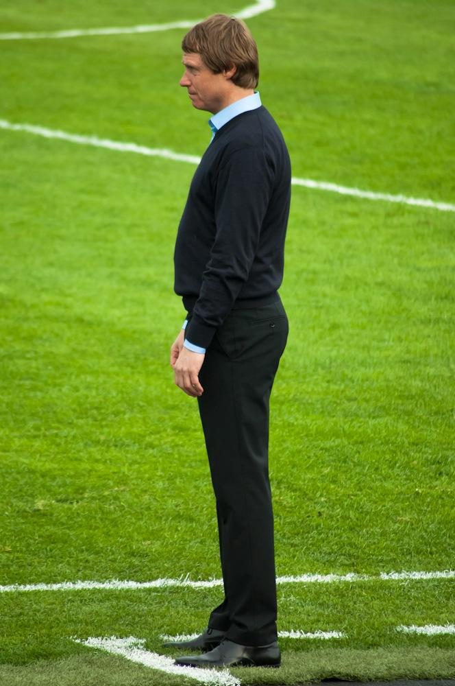 Олег Георгиевич Кононов — белорусский тренер.